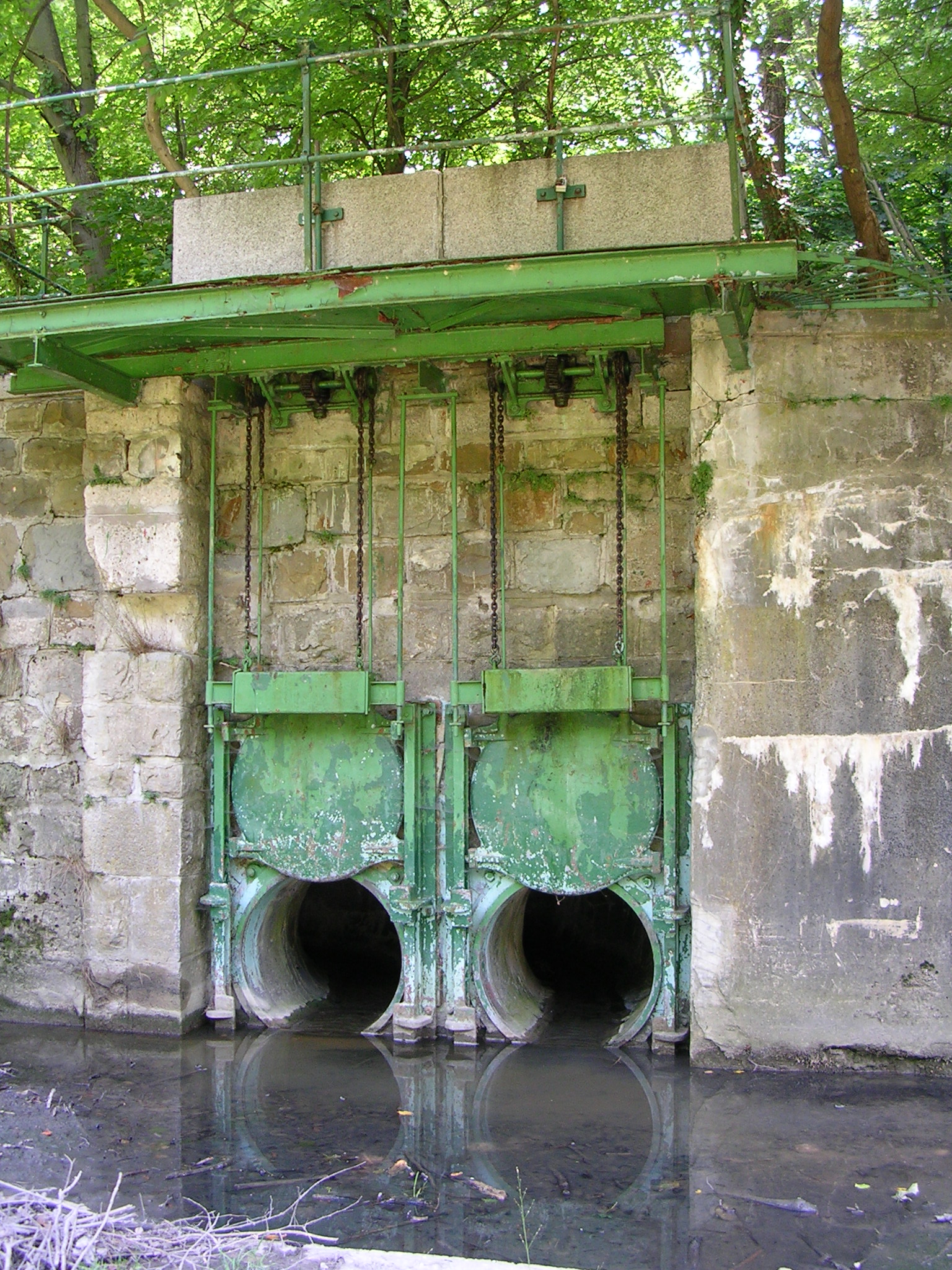 Einlaufbauwerk der Als an der Mündung der Als mit dem Parkbach (Eckbach) in Wien-Hernals